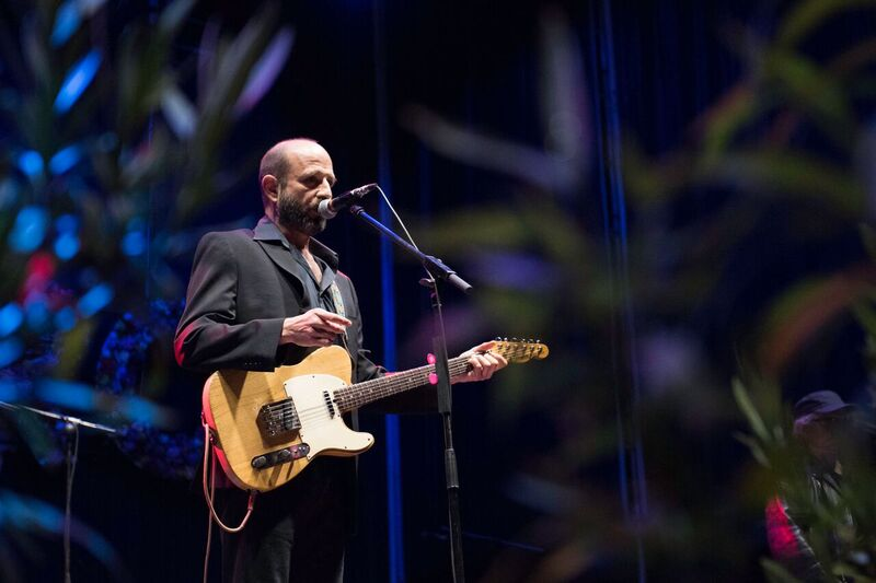 La música tomó las calles en la primera noche de San Isidro 2017, dejando espacio a raíces, tradición y vanguardia venidas de distintos lugares físicos y emocionales.